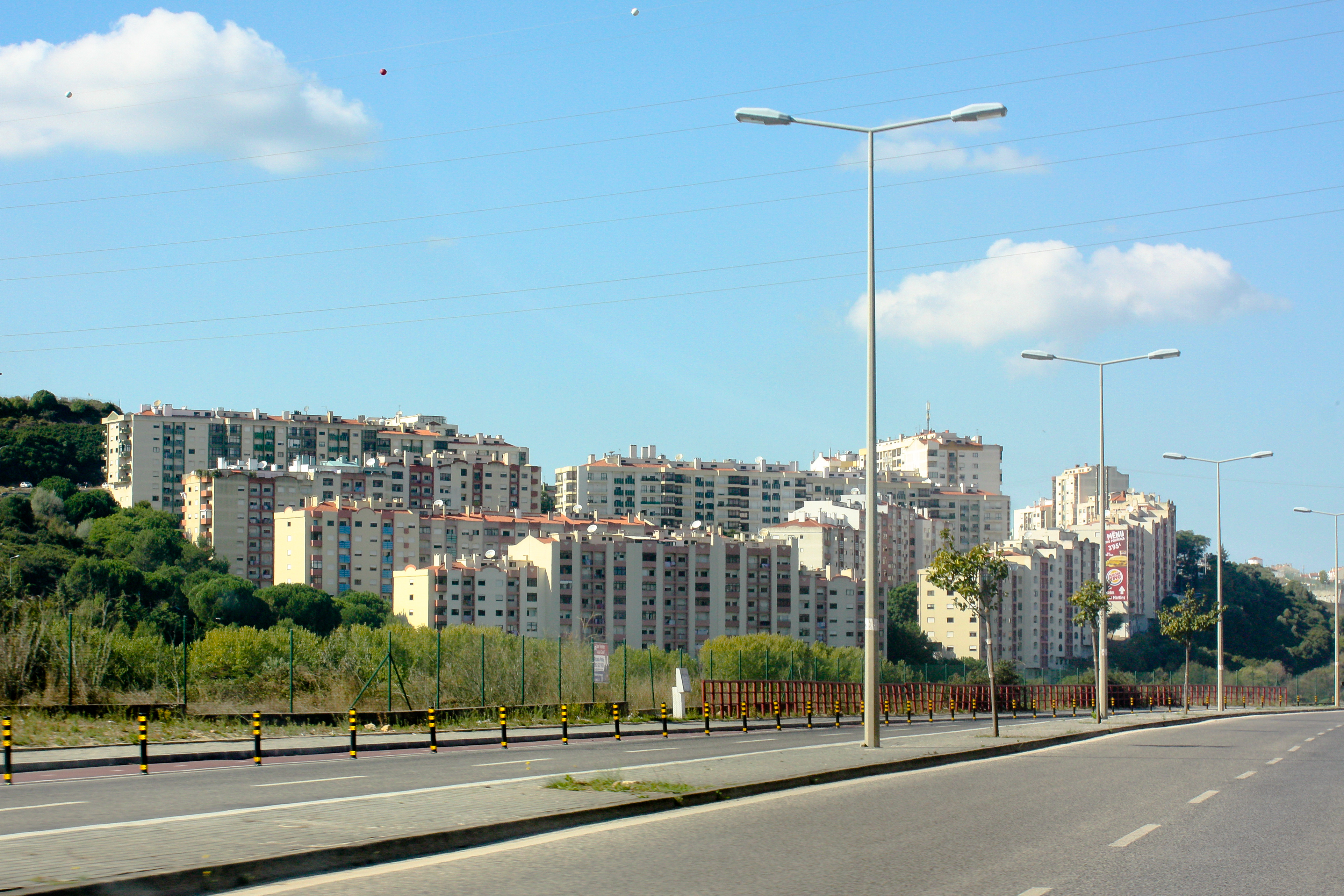 Visão geral do bairro de Casal do Cotão, em São Marcos do Cacém.